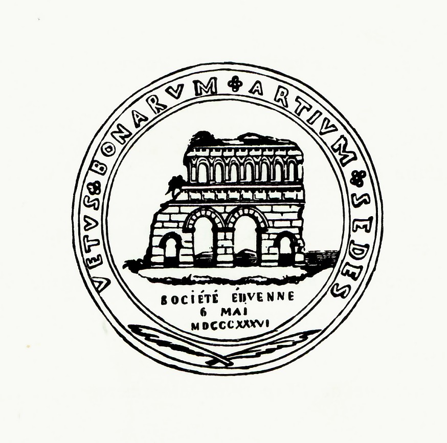 Logo